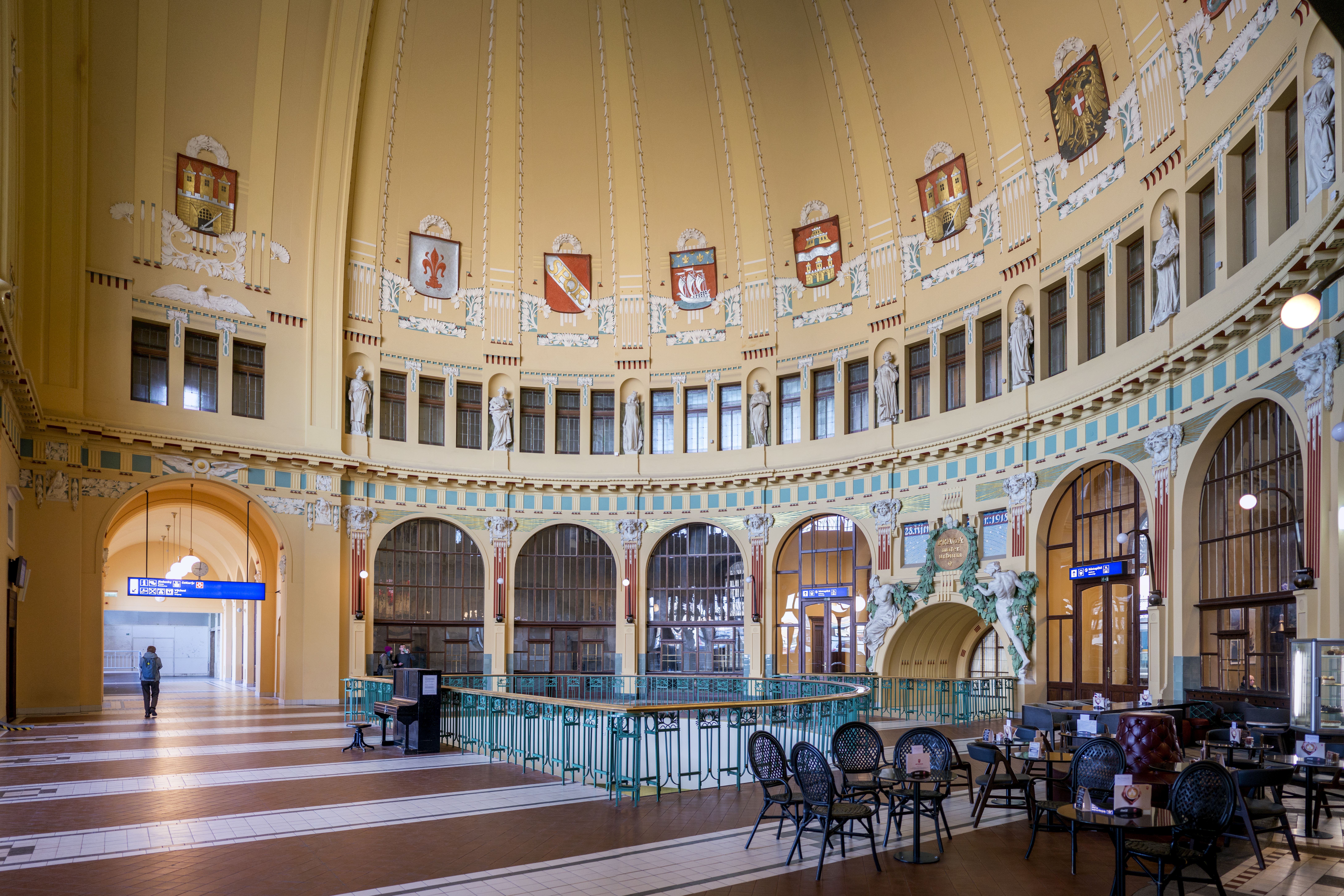 Prag Jugendstil Hauptbahnhof